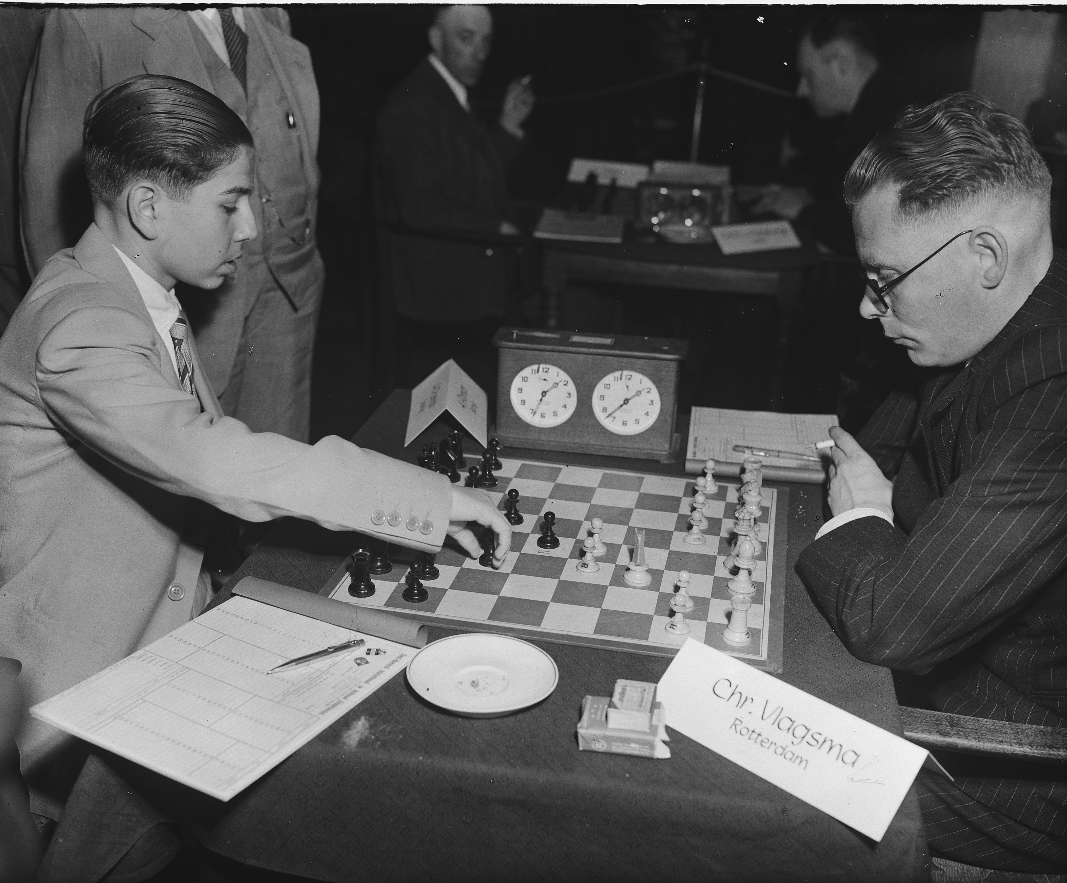 Collectie / Archief : Fotocollectie Anefo Reportage / Serie : [ onbekend ] Beschrijving : Schaaktoernooi Baarn. Arturo Poma Salamanca vs. Chris Vlagsma, remise Datum : 9 mei 1947 Locatie : Baarn Trefwoorden : SCHAAKTOURNOOI Fotograaf : Wisman, Bram / Anefo Auteursrechthebbende : Nationaal Archief Materiaalsoort : Glasnegatief Nummer archiefinventaris : bekijk toegang 2.24.01.09 Bestanddeelnummer : 902-1555